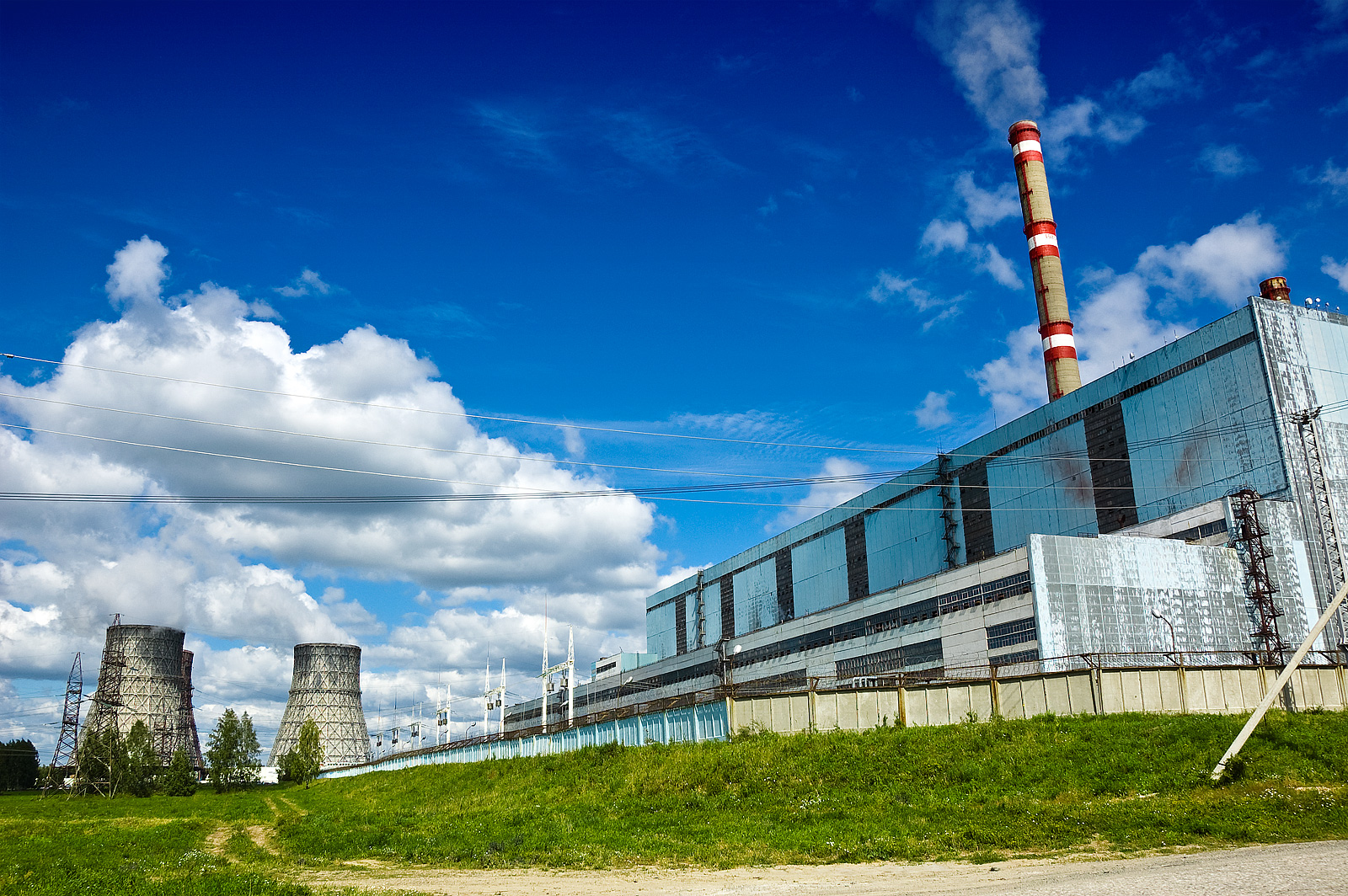 Новосибирская ТЭЦ-5